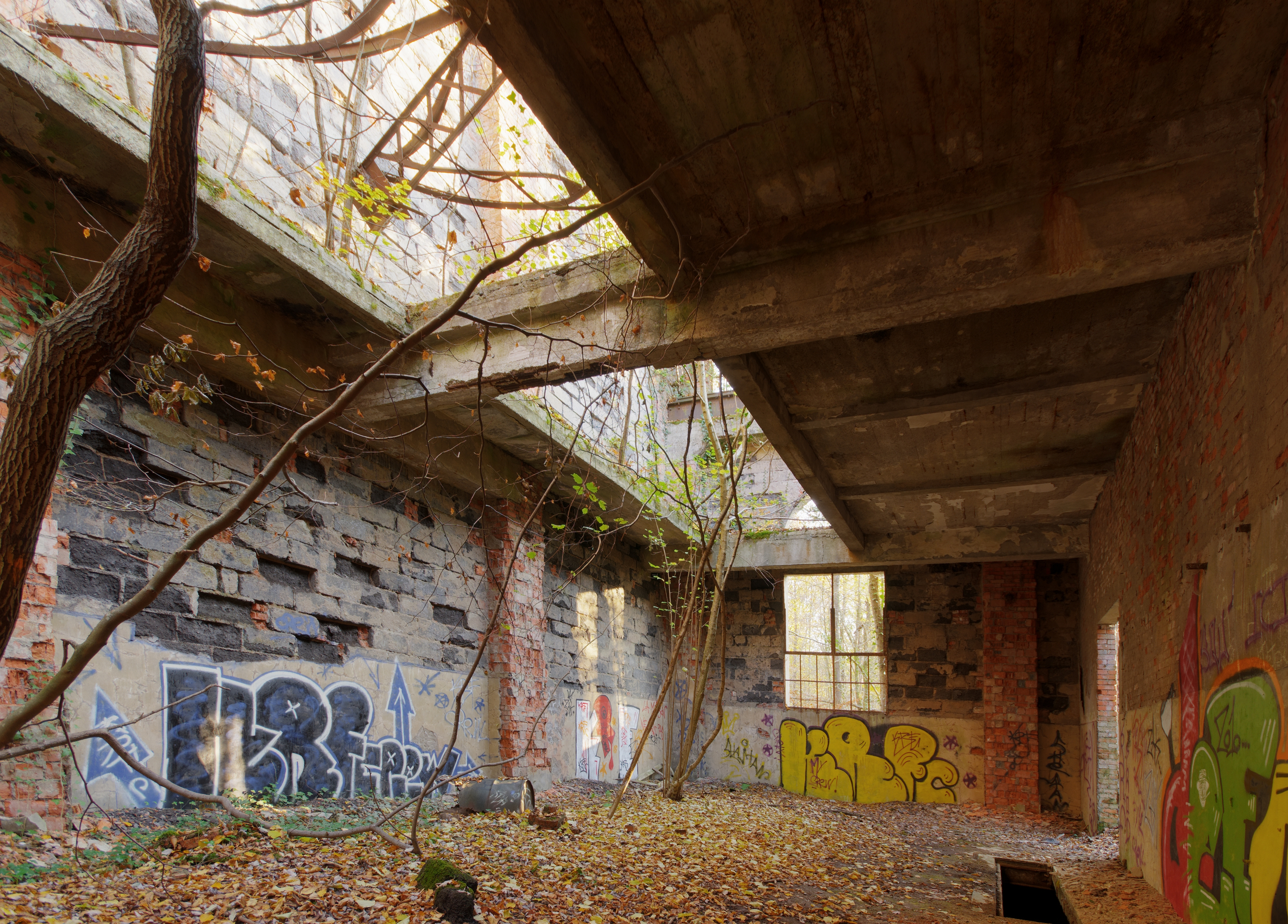 This photograph was taken with a Nikon D300 Puits Arthur-de-Buyer : la salle des génératrices alimentant le moteur de 1650 CV de la machine électrique. (HDR).